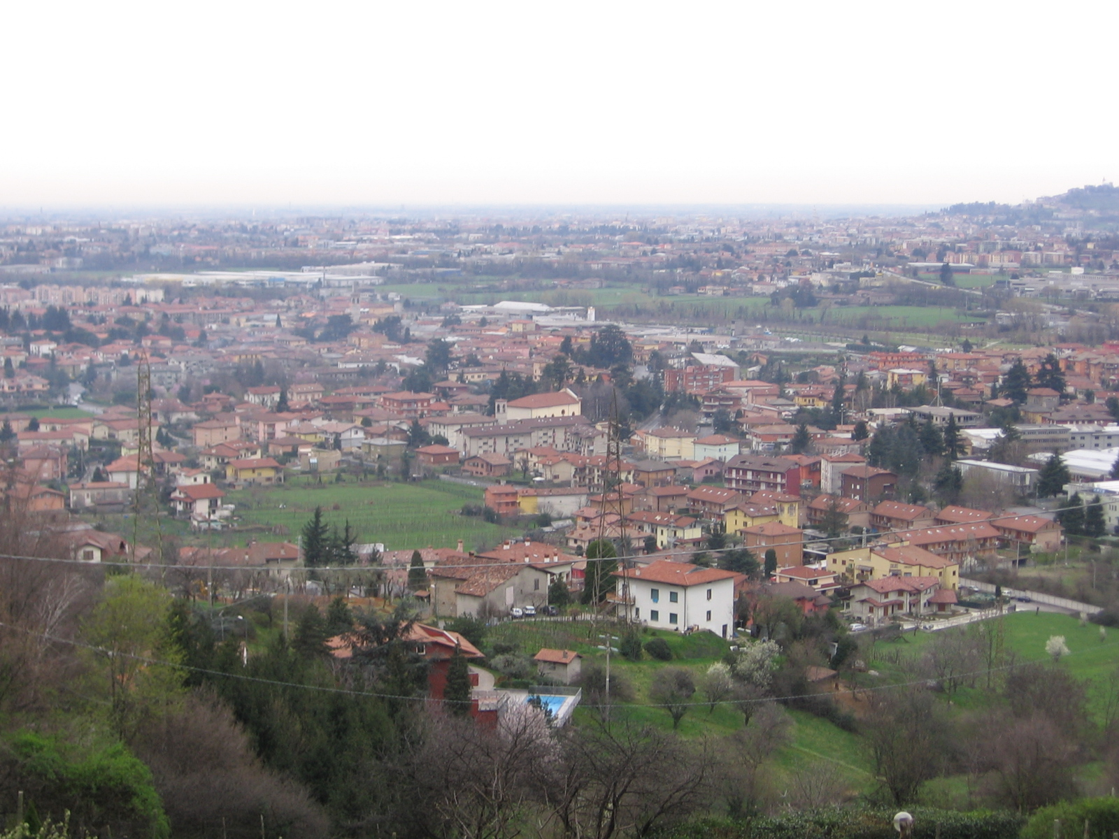 Villa di Serio, Bergamo, Italia